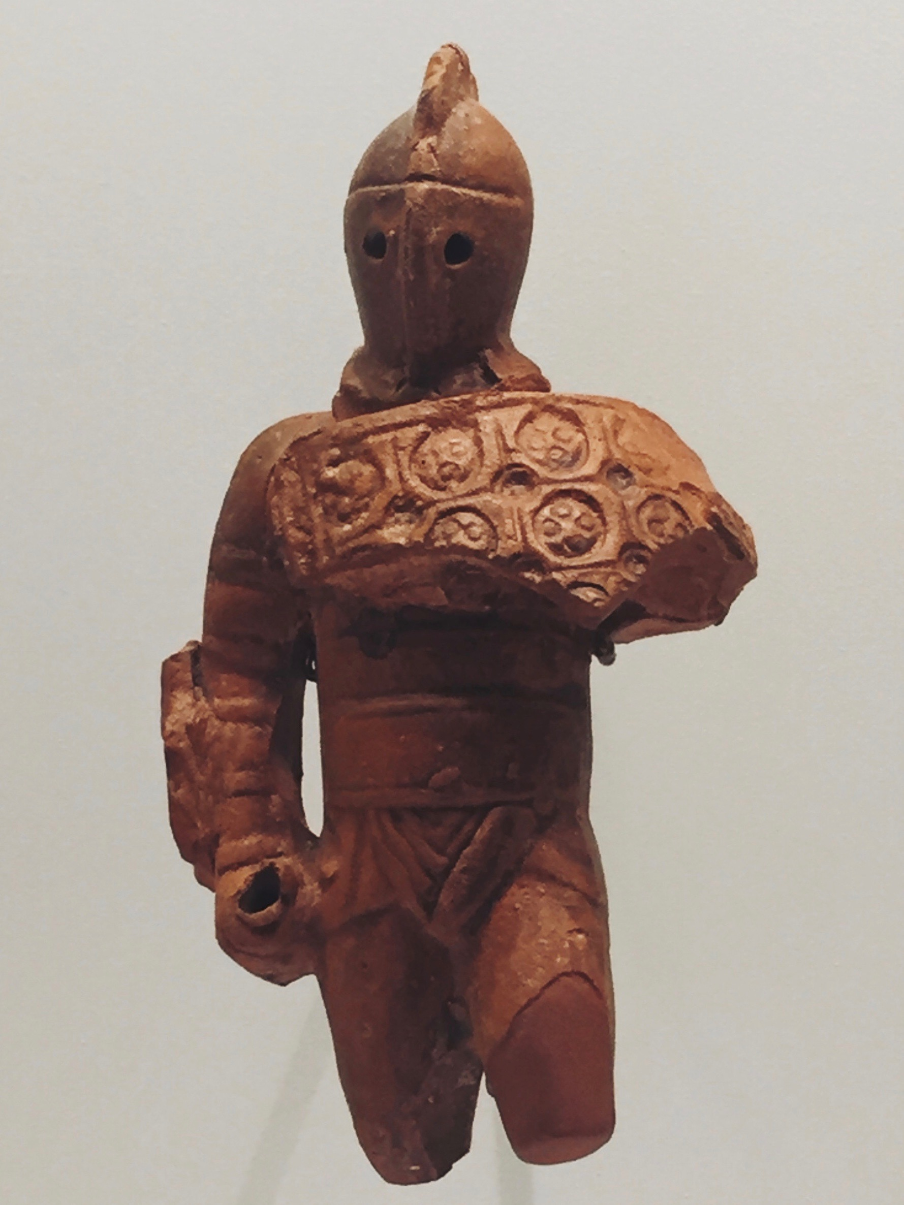 تمثال لمجالد رومي من نوع سامني مصنوع من الطين النضيج القرن الثاني قبل الحقبة العامة عثر عليه في وليلي عارض في متحف التاريخ والحضارات